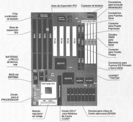 Esquema de una placa base formato AT